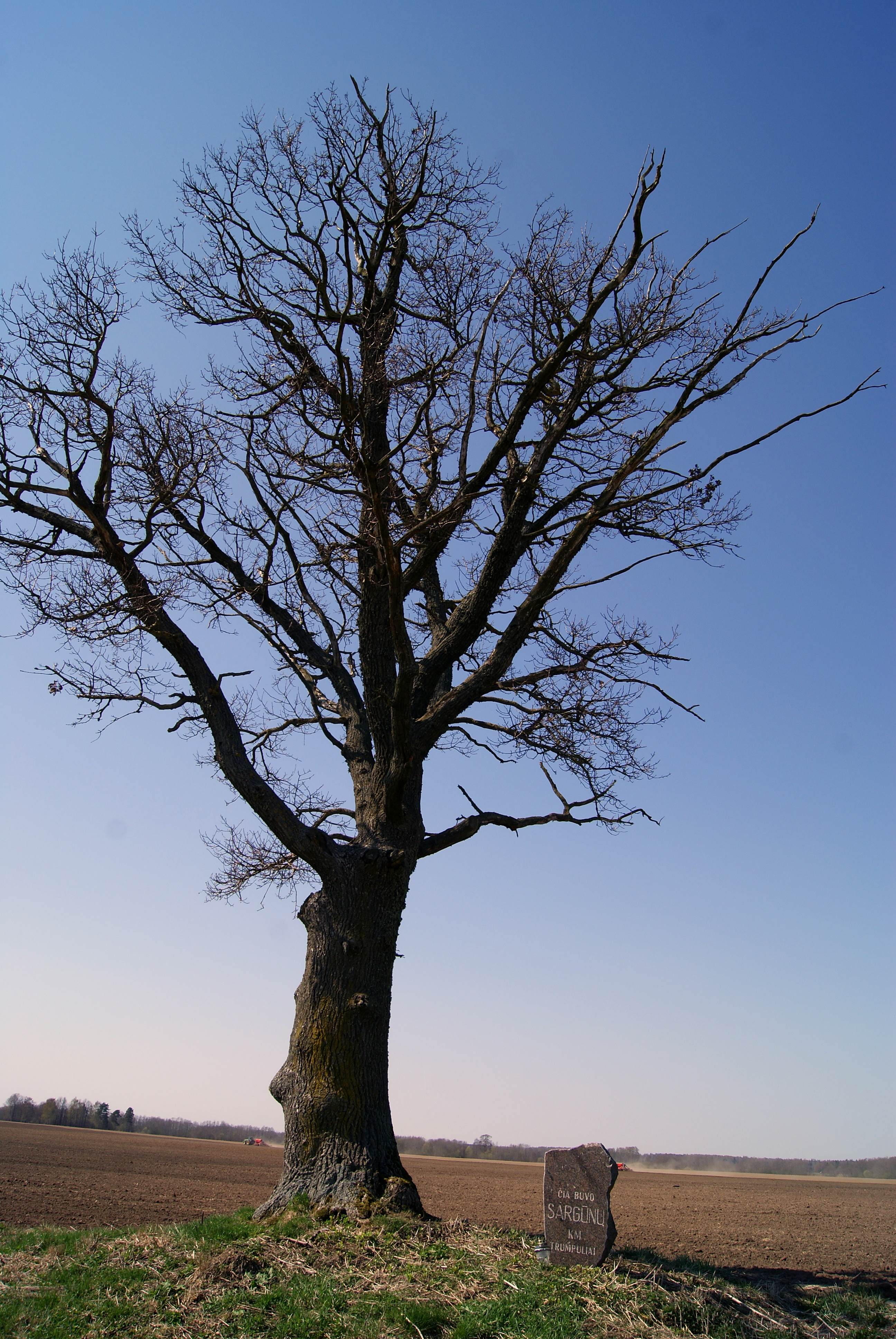 Joniškio sen., Lithuania